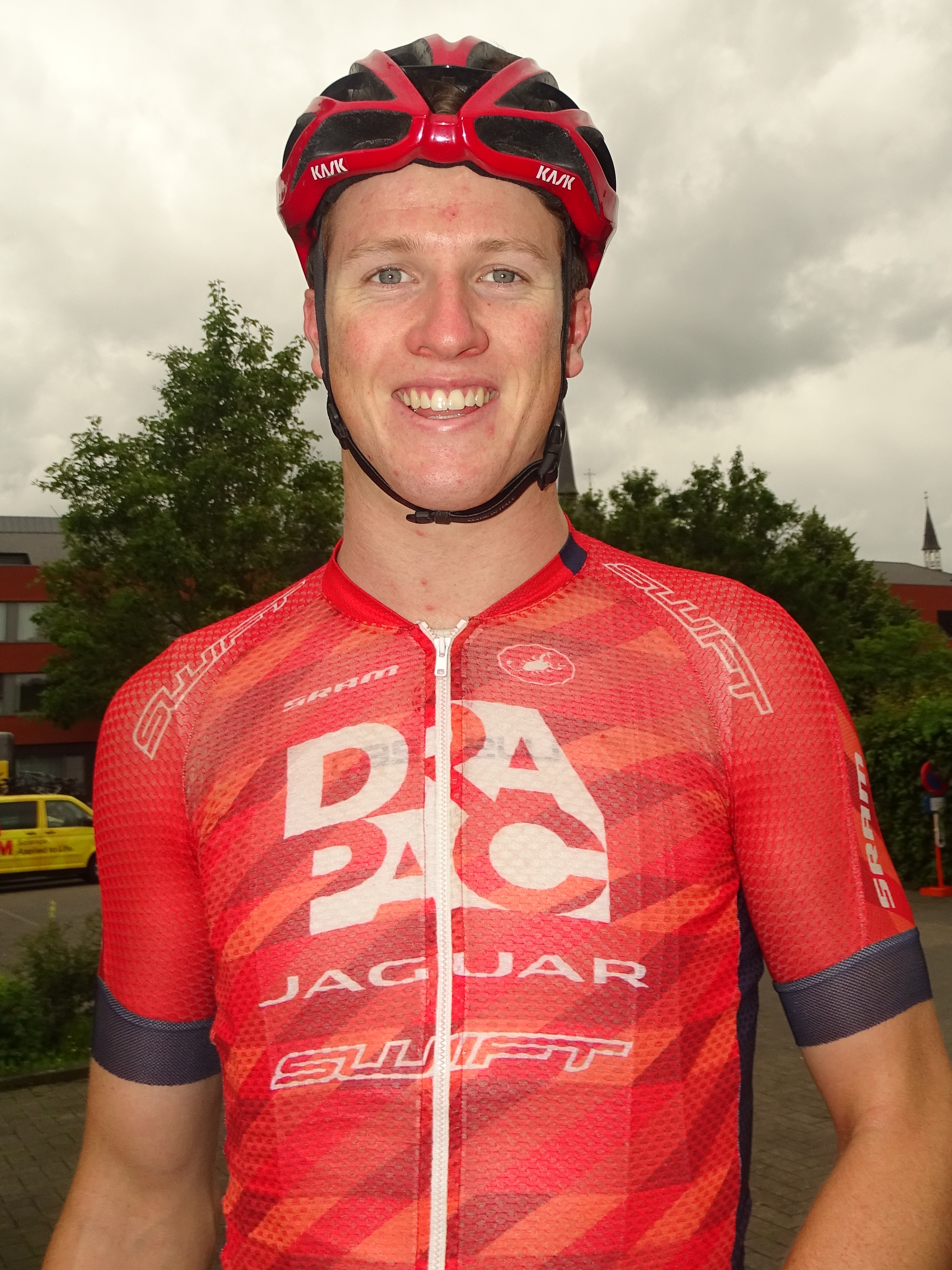 Reportage réalisé le mercredi 22 juin à l'occasion du départ de Halle-Ingooigem 2016 à Hal, Belgique.